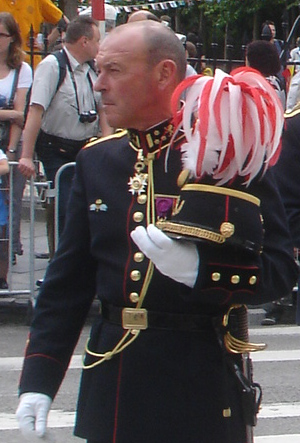 Officier Koninklijke Militaire School